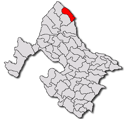 Categorie:Hărţi ale judeţului Mehedinţi